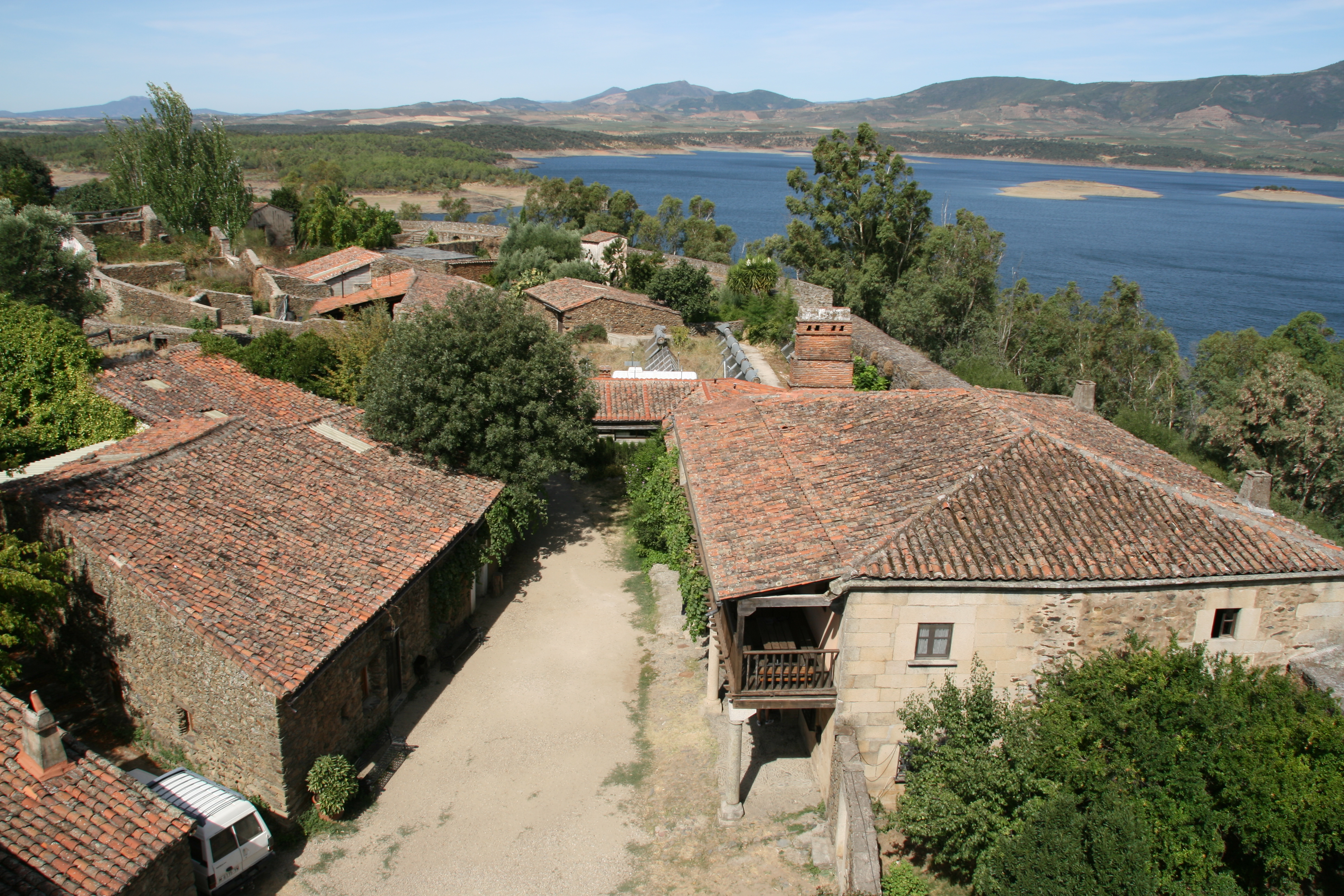 Antigua casa rectoral en Granadilla, vista desde el castillo. Actualmente se usa de comedor para los alumnos